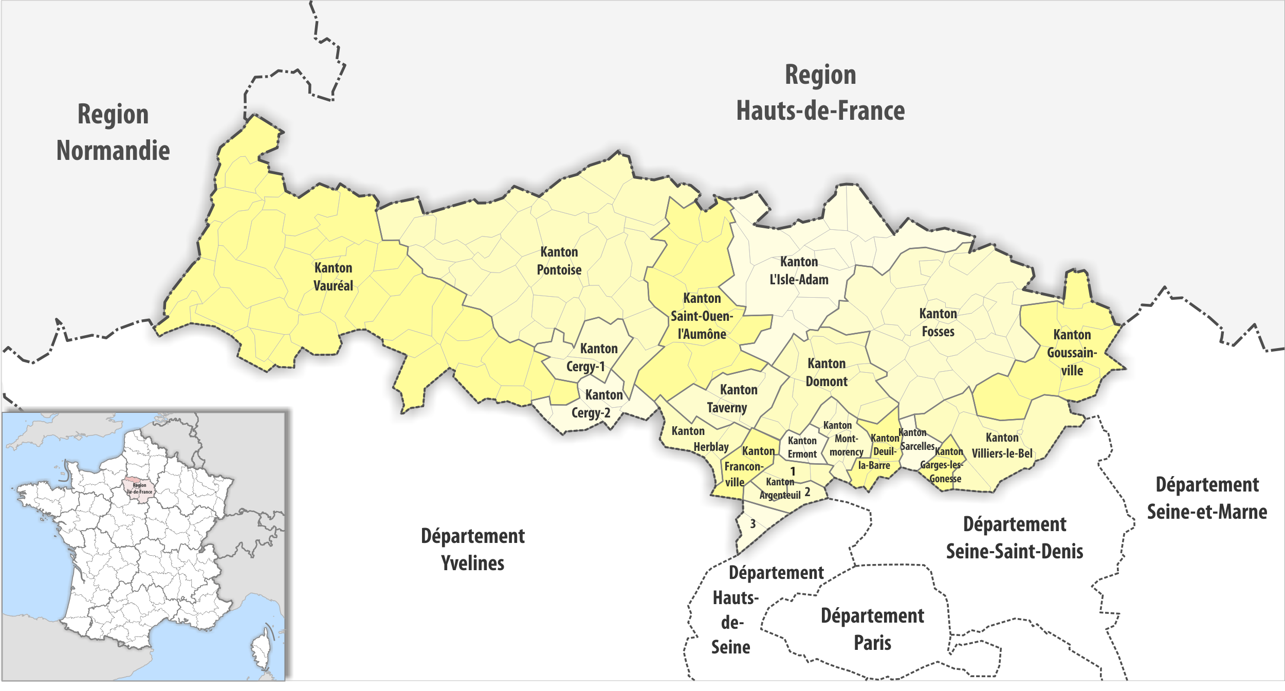 Gemeinden und Kantone im Departement Val-d'Oise